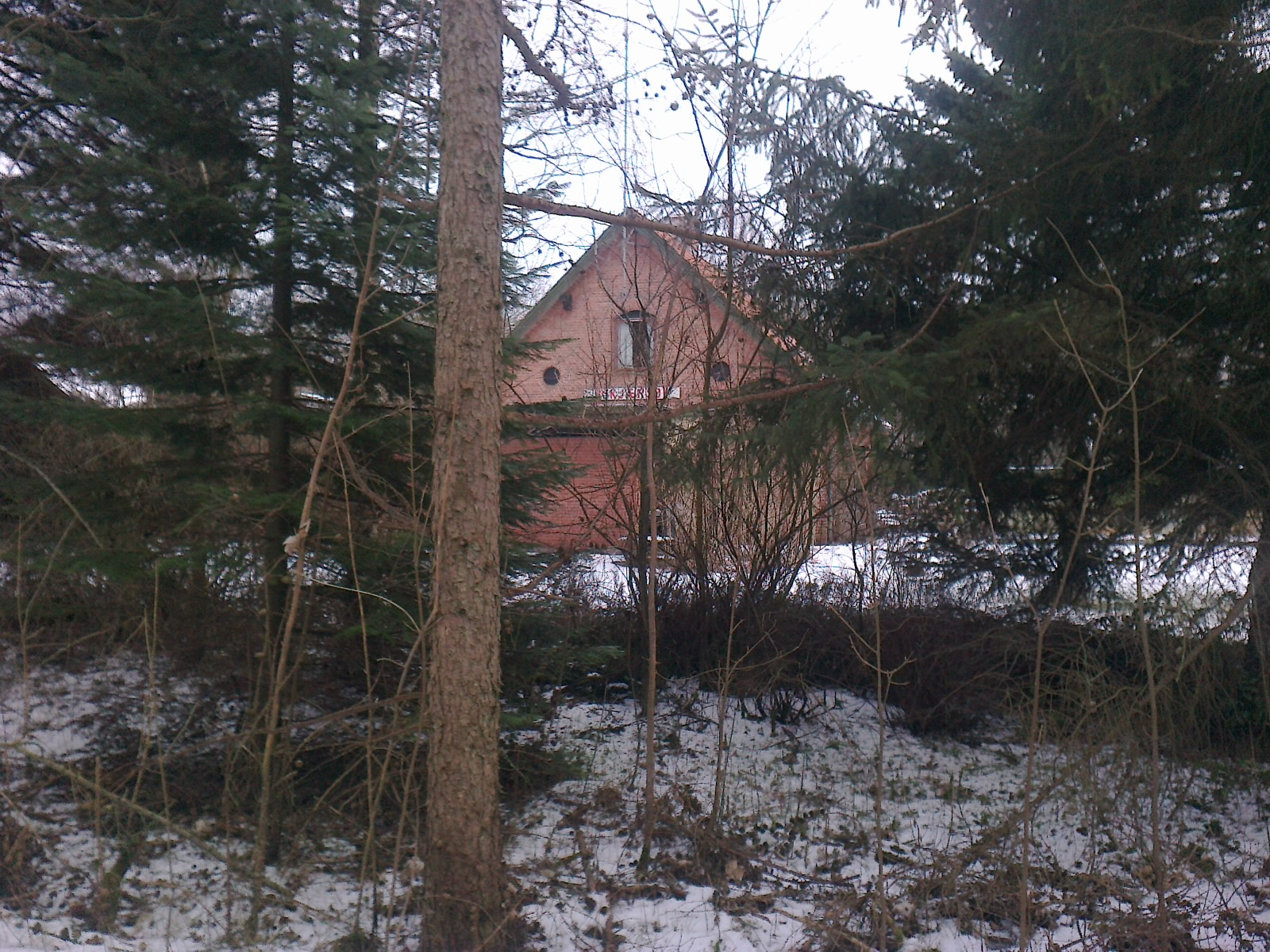 Skærsø Station